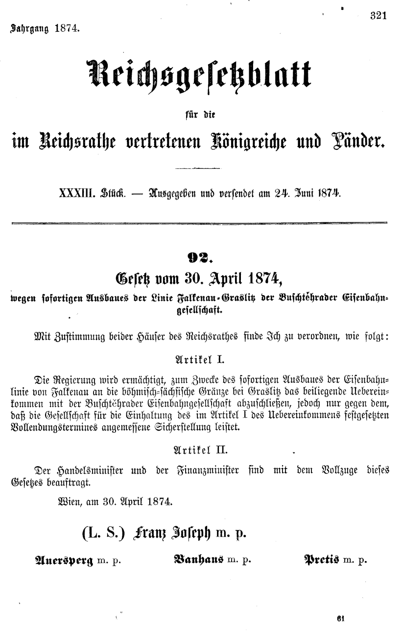 Reichsgesetzblatt 1874